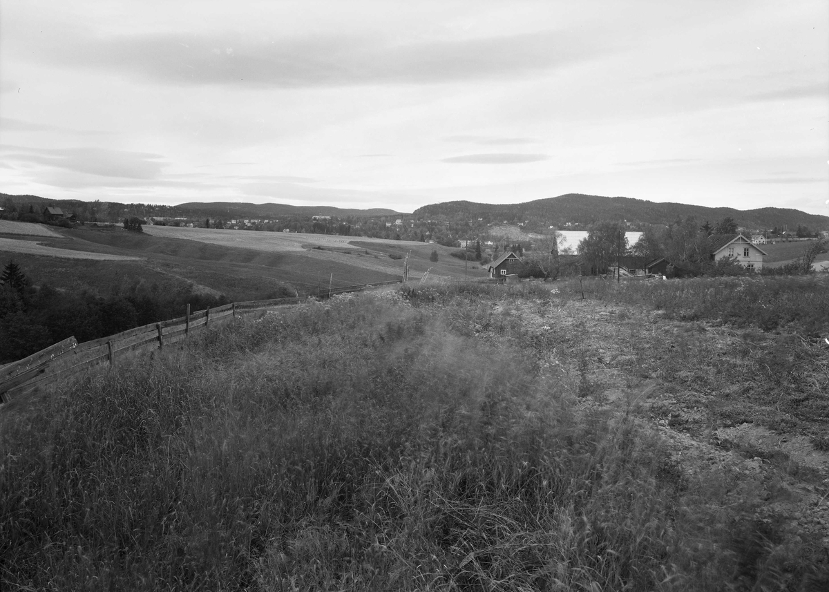 Granstangen gård sett fra Grorudveien mot Trondheimsveien.